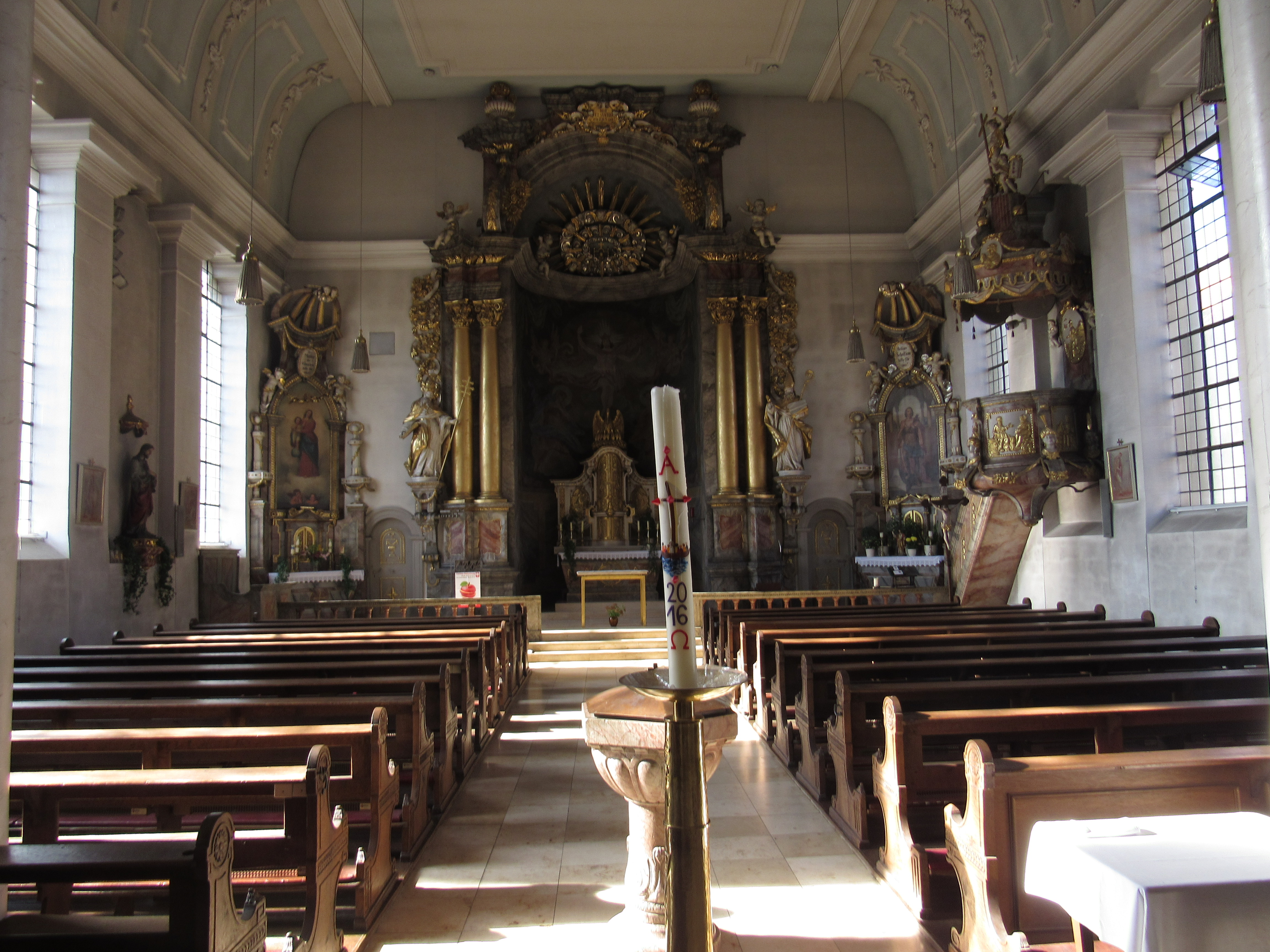 Inneres der Kirche